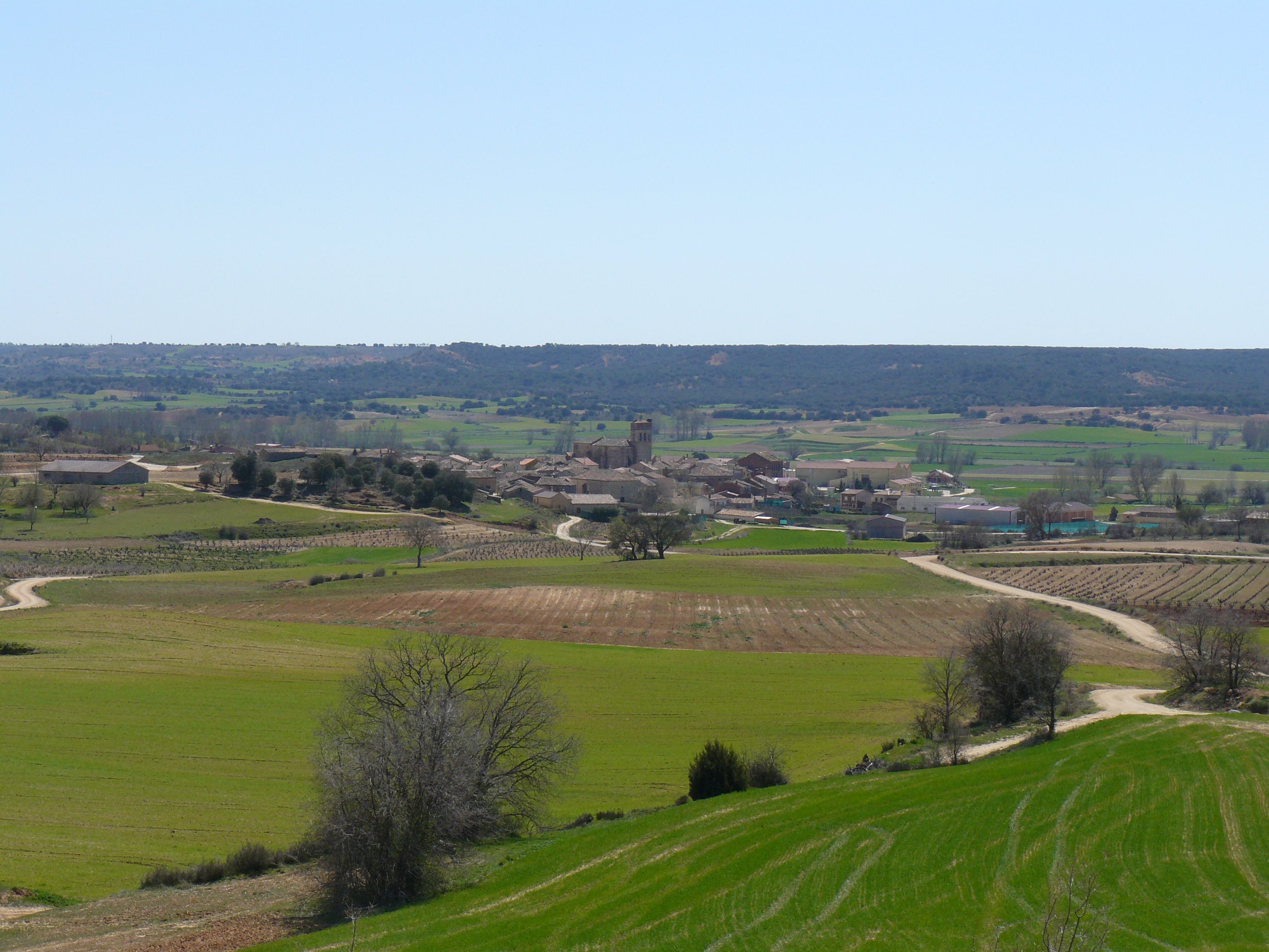 Quintana del Pidio, Burgos.